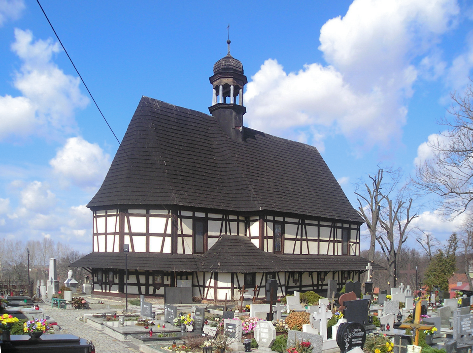 kościół cmentarny pw. Świętego Krzyża, szach., 1705 Głogówek, Głogówek 04.20.